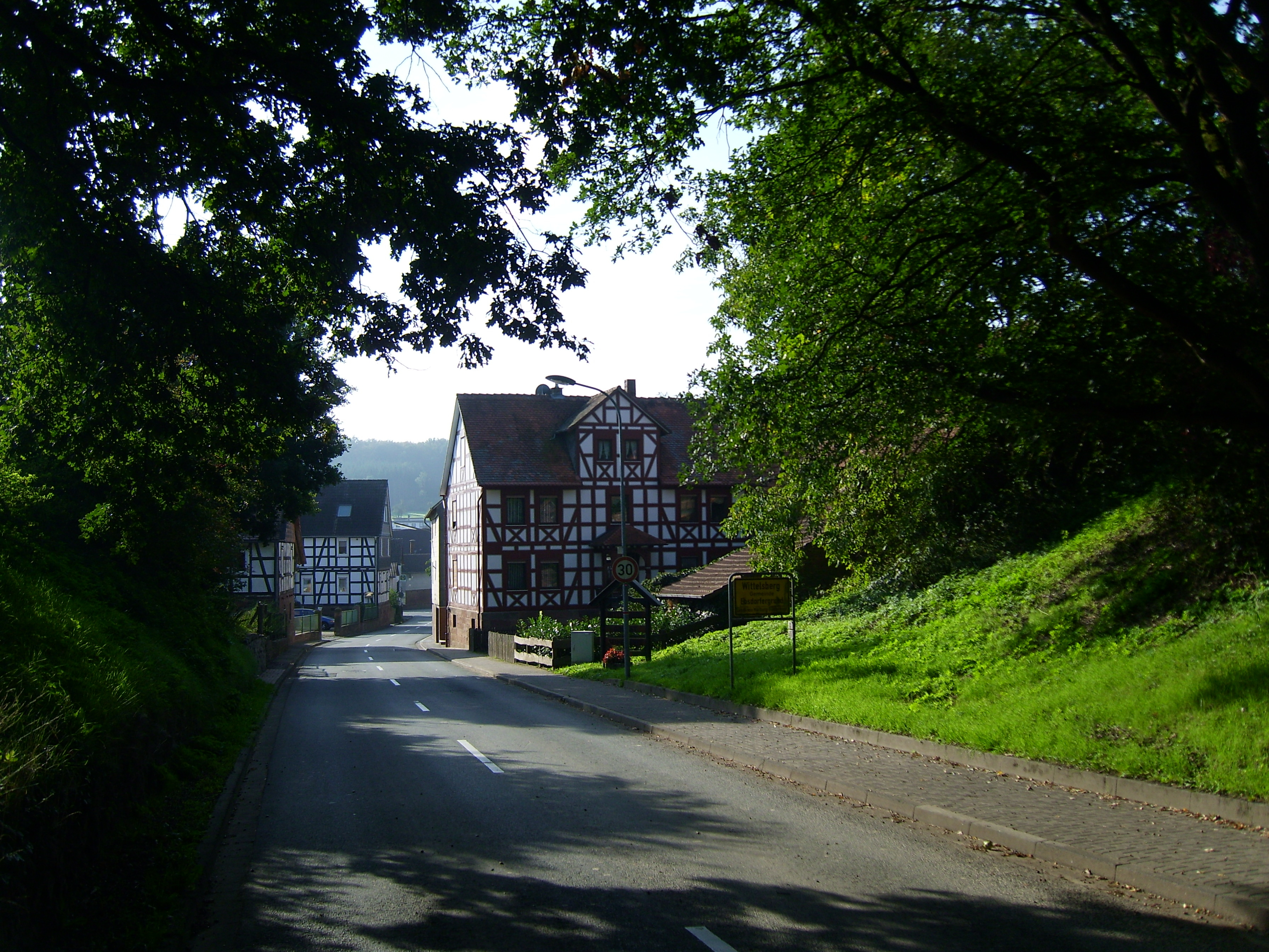 Ortseingang Wittelsberg von Richtung Moischt (Moischter Straße) aus; links der Bauernhof Nr. 1, rechts das Haus Nr. 8.